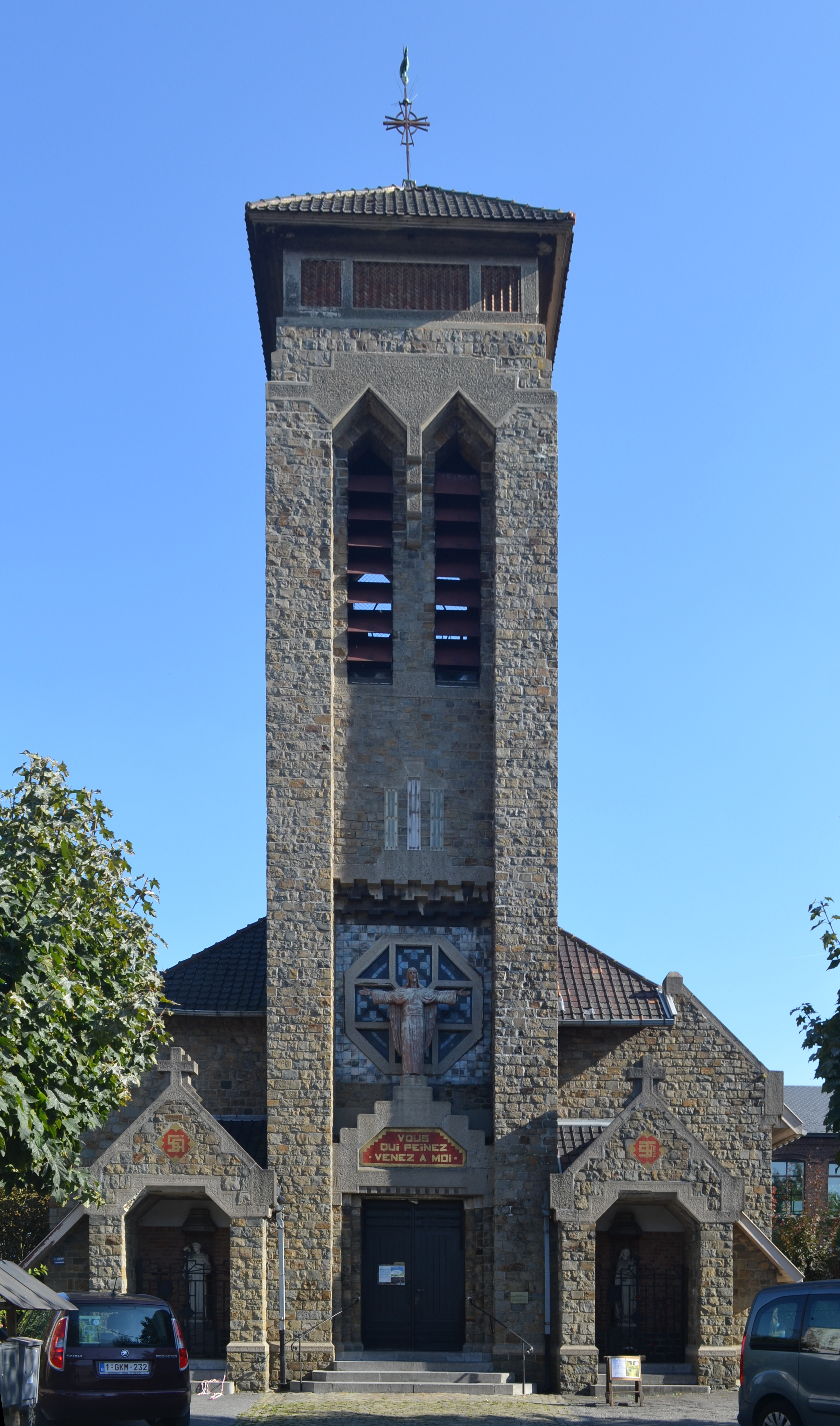 Marcinelle - Église du Sacré-Cœur